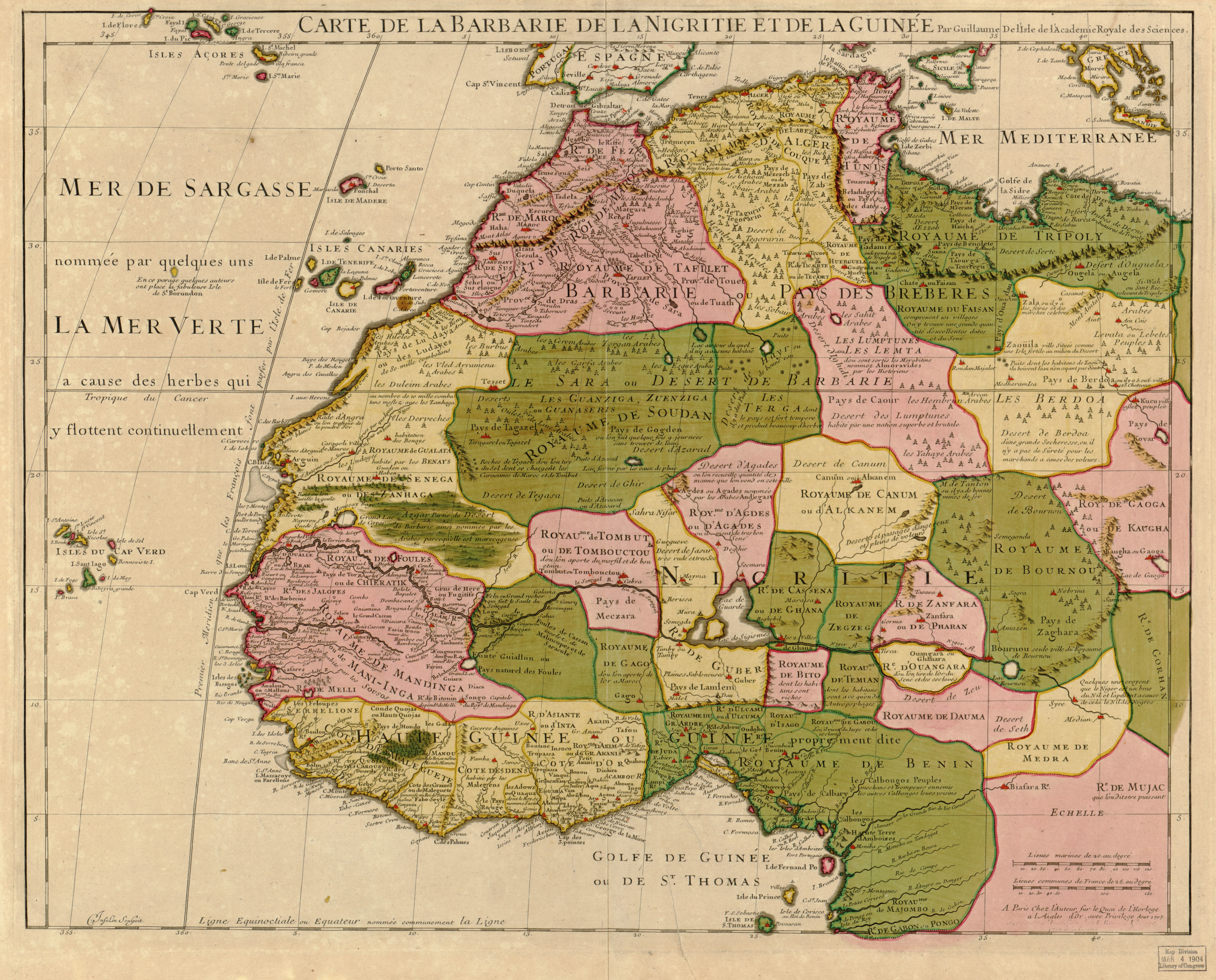 Map of North West Africa (original title: Carte de la Barbarie de la Nigritie et de La Guinee)